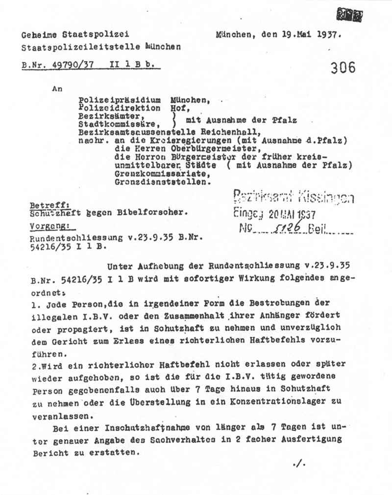 Schutzhaft-Erlass der Gestapo München gegen Bibelforscher, 19.5.1937 (Seite 1/2)